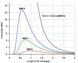 Proyecto de Innovación Docente 2013 de la ETSI de Telecomunicación UPM; coordinador P. Mareca, subido por Alvaro Nieto